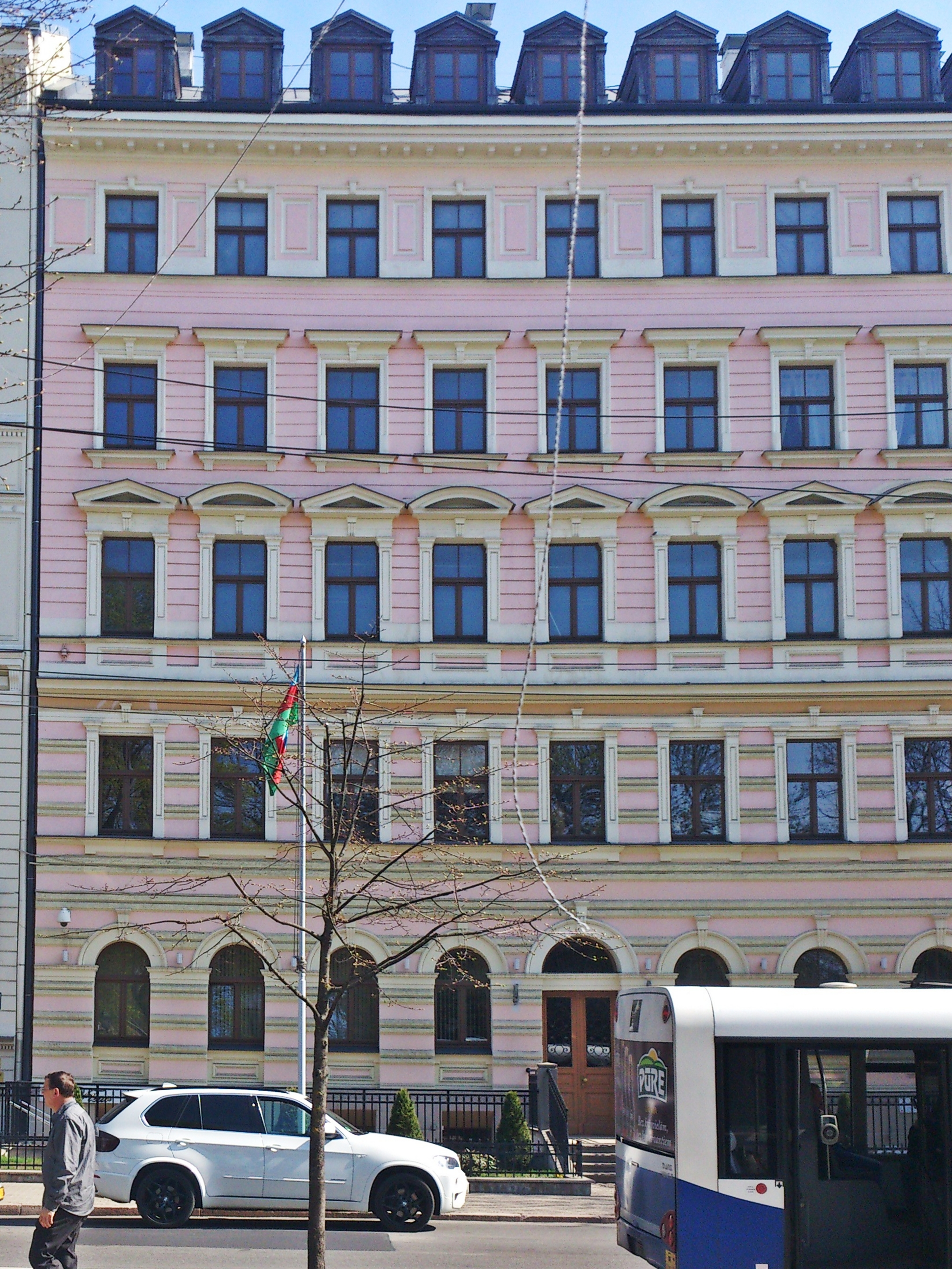 Посольство Азербайджана в Латвии